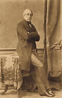 Friedrich Wilhelm von Redern vers 1875